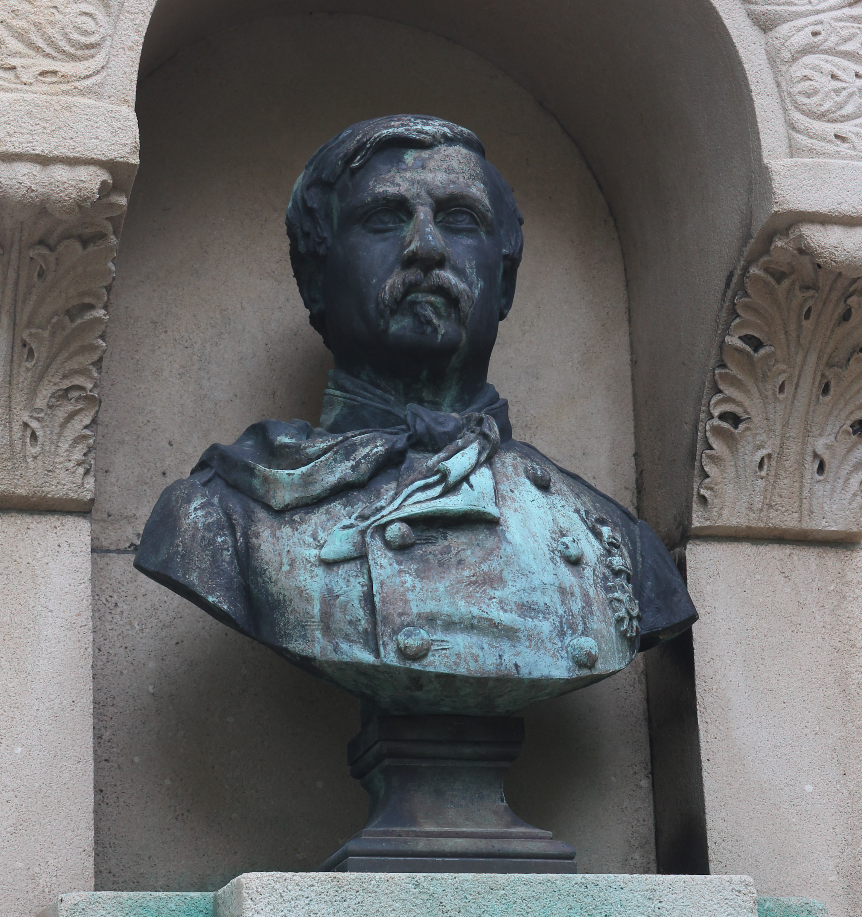 Tombeau en plusieurs éléments. La stèle porte en partie inférieure une couronne sculptée en relief surmontée d'une épitaphe. La partie supérieure porte une niche en plein cintre contenant un buste en bronze signé A. Courtet, 1872. L'ensemble est entouré d'une grille en ferronnerie.